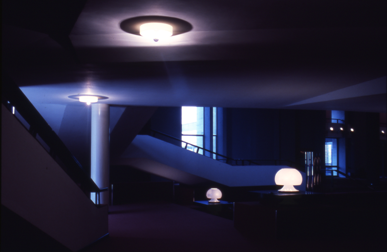 Servizio fotografico : Bologna, 1976 / Paolo Monti. - Foglio: 1, Fotogrammi complessivi: 10/20 : Diapositiva, sviluppo cromogeno/ pellicola ; 35 mm. - ((Sullo chassis della diapositiva n. 05 iscrizione manoscritta "Bo Palazzo/ Affari". - Nel contenitore 316/330D tra i fogli in pvc contenenti le diapositive ritaglio di stampa fotografica con al verso iscrizione manoscritta: "Bologna/ Palazzo Affari [...]". - Le diapositive nn. 01-04 e 15-20 costituiscono altre serie. - Palazzo costruito nel 1962-1967. - Occasione: Documentazione per la pubblicazione: Renzi Renzo, "Storia dei luoghi della città di Bologna", Bologna, E.P.T., 1976. - Fonte: Rubrica di Paolo Monti: Diapositive 24x36mm (1948-1982), presso Archivio Paolo Monti. Rubrica con elenco soggetti e numeri di inventario (da 1 a 1000) corrispondenti ai fogli a tasche in pvc in cui sono contenute le diapositive. - Fonte: Monografia di Renzi, Renzo: Storia dei luoghi della città di Bologna, Bologna, E.P.T. (1976). - Fonte: Agenda di Paolo Monti: Monti - Agenda 1976 (1976/00/00), presso Archivio Paolo Monti